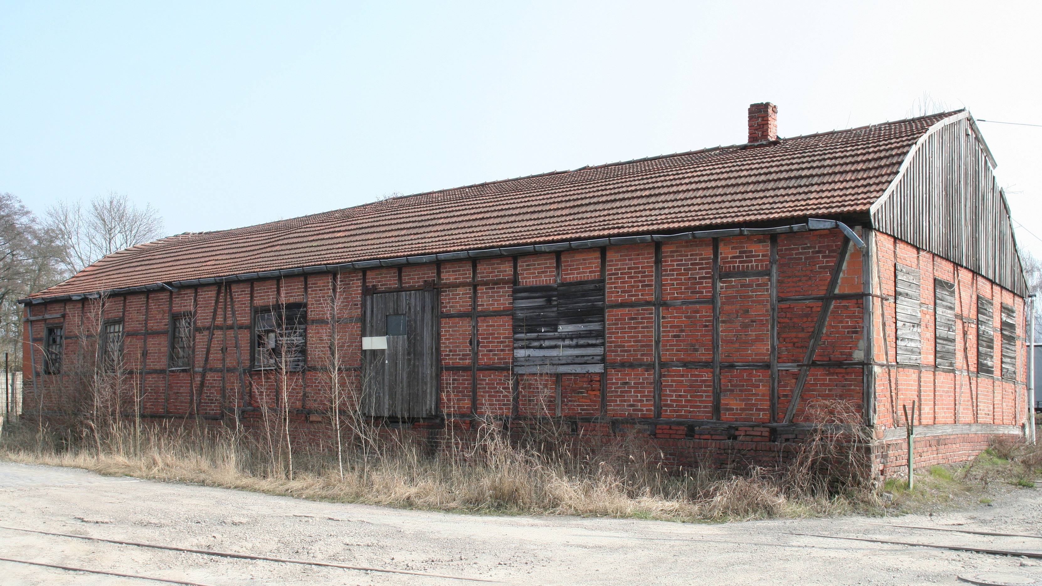 Coburger Güterbahnhof, Lagerhaus von 1926 mit Zollingerdach